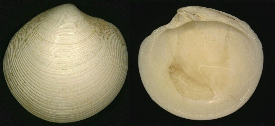 Familie: Veneridae Groesse: 150 mm Verbreitung: West-Mexiko bis Peru Fundort: Costa Rica, Prov. Puntarenas, Torcoles leg.det. U.Schmidt, 1996 Photo: U.Schmidt, 2007